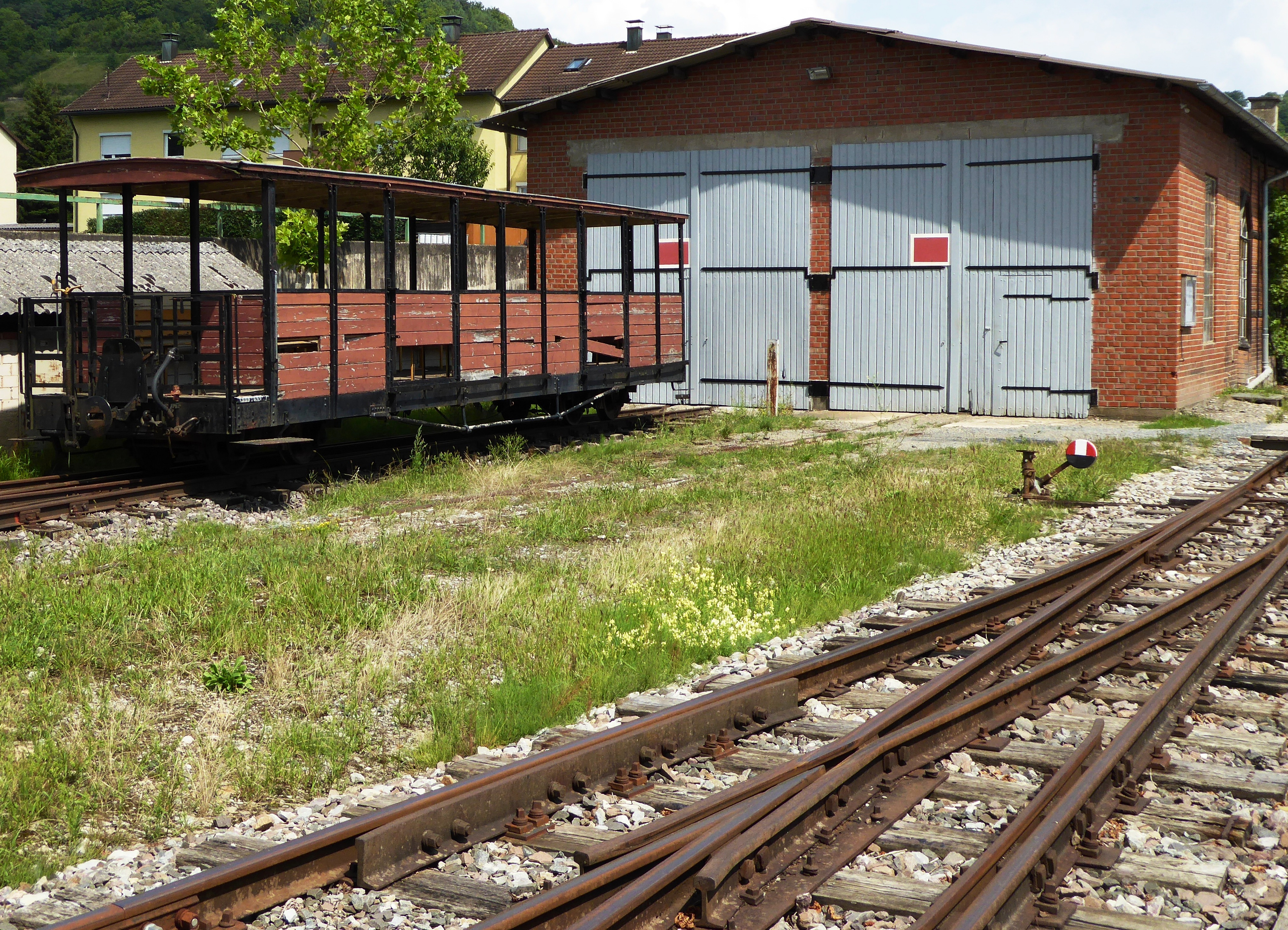 Lokschuppen am Bf Dörzbach mit abgestelltem Aussichtswagen (Aufn. 2014)